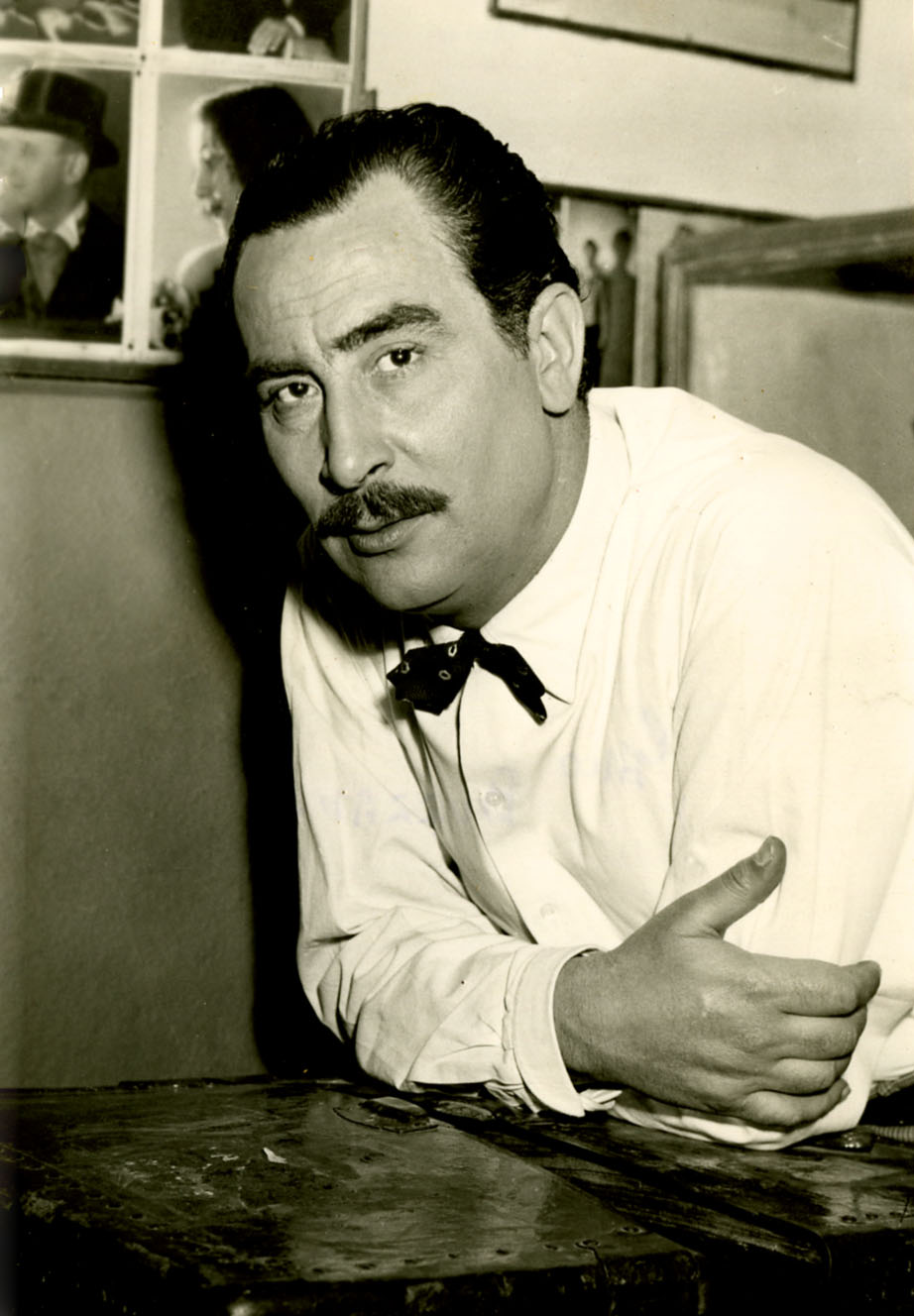 Gino Buzzanca